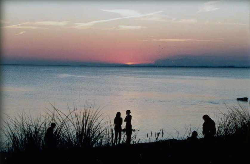 {Solnedgangen ved Svinø Strand, når havet er blikstille hører til blandt de smukkeste i landet.